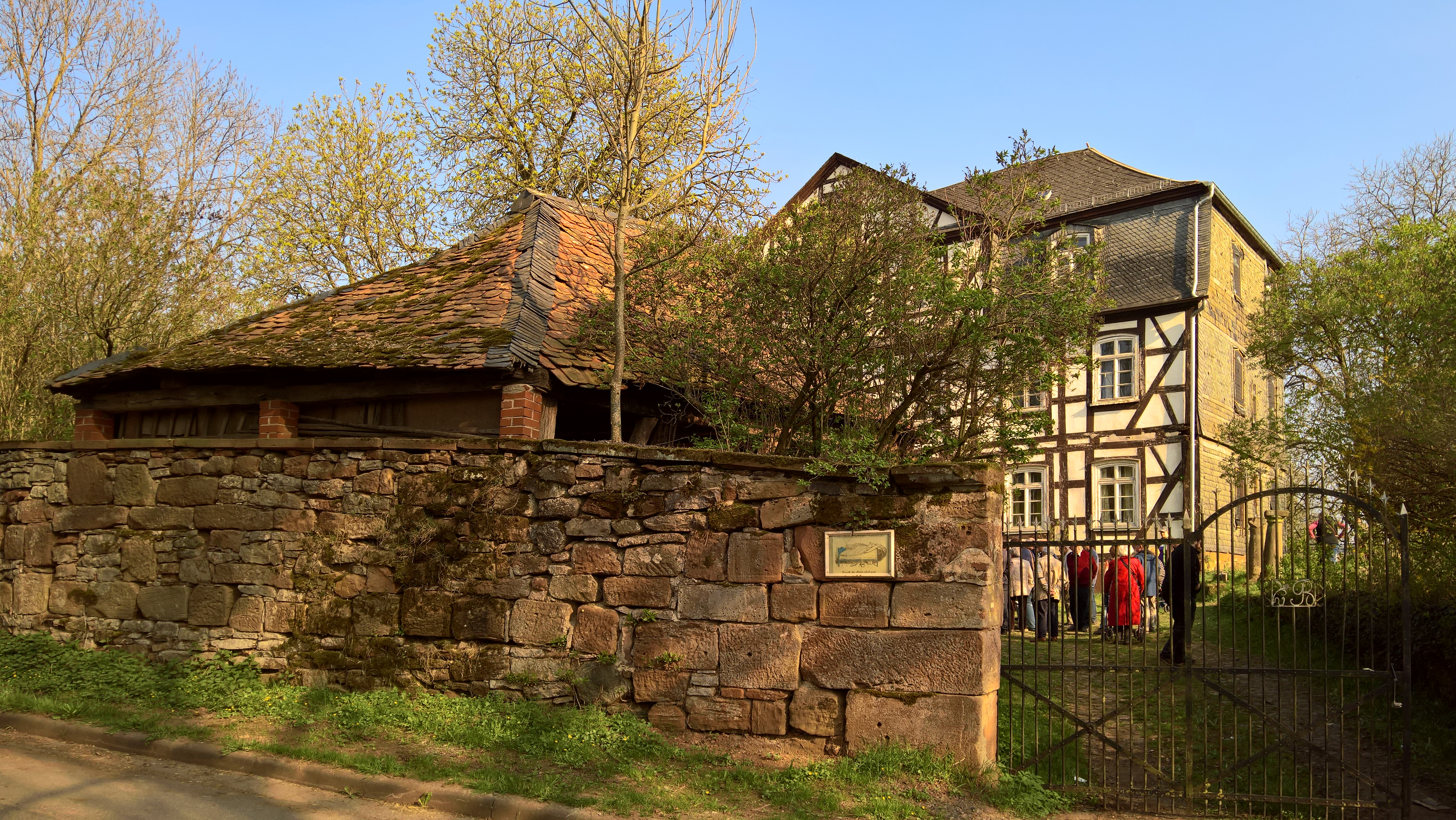 Eingang zum Schloss - Fachwerkbau